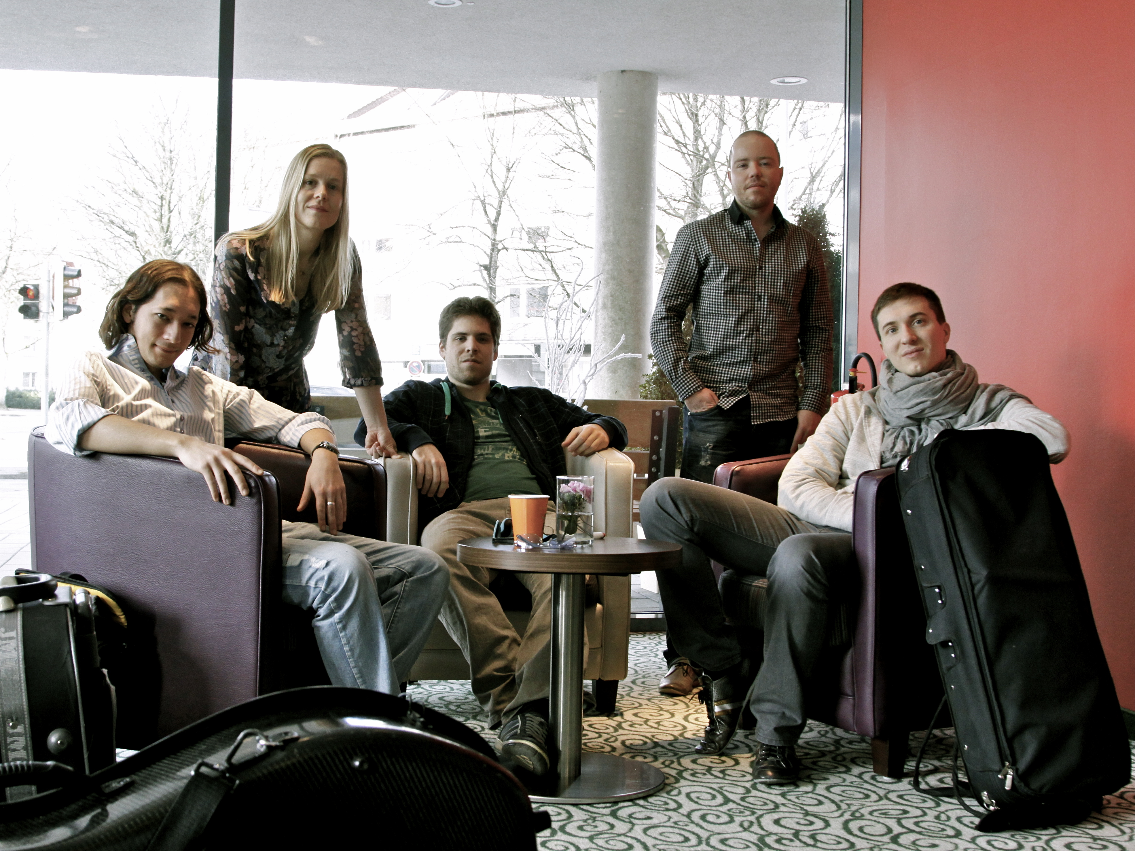 Spark in Gütersloh, v.l.n.r. Mischa Cheung, Andrea Ritter, Victor Plumettaz, Stefan Glaus, Daniel Koschitzki